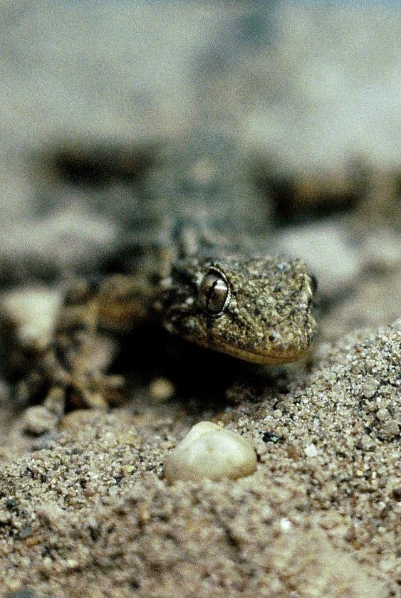 Fali gekkó (Tarentola muritanica fascircularis) Tunéziában